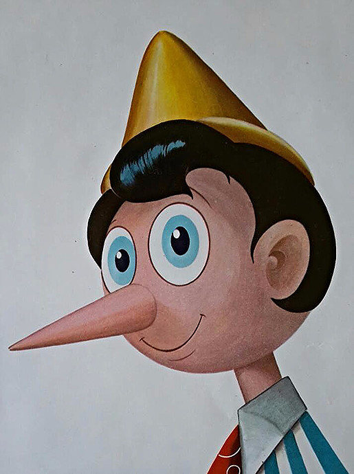 Scapinelli ha illustrato Pinocchio per la rivista per ragazzi "Lo Scolaro" e per la collana di libri per ragazzi della carroccio editore